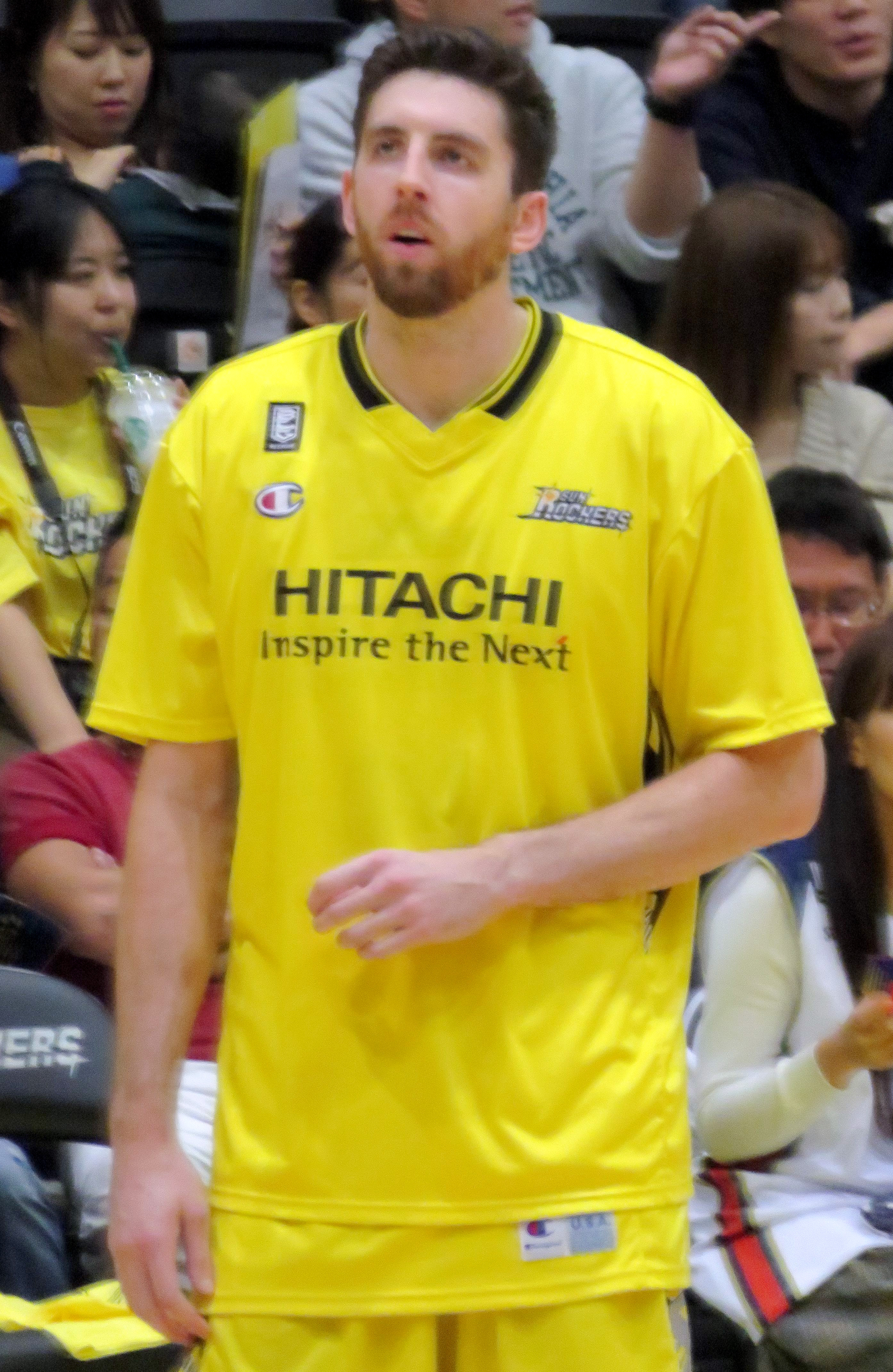 2018年10月28日撮影 2018-19 B1 第六節 渋谷-横浜 青山学院記念館